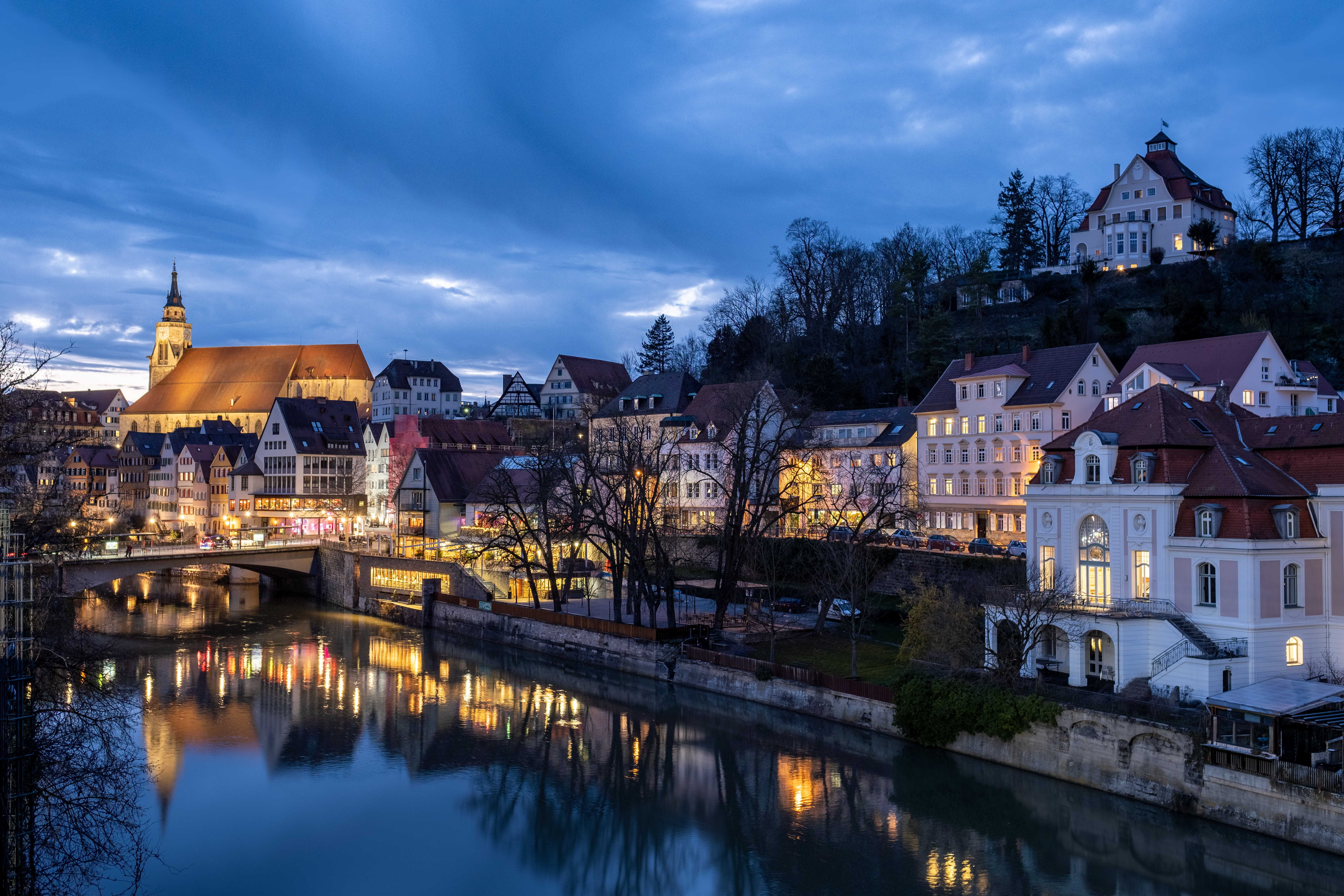 Neckarfront mit Stiftskirche und Schwabenhaus zur blauen Stunde Gesehen vom Neckar-Parkhaus